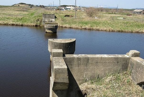 остатки ж/д моста через реку Чёрная (Фур), на юге Красногорска, напротив электростанции № 7